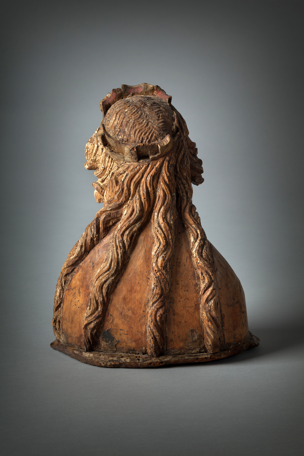 Světice z Dolní Vltavice (zadní strana), Alšova jihočeská galerie v Hluboké nad Vltavou